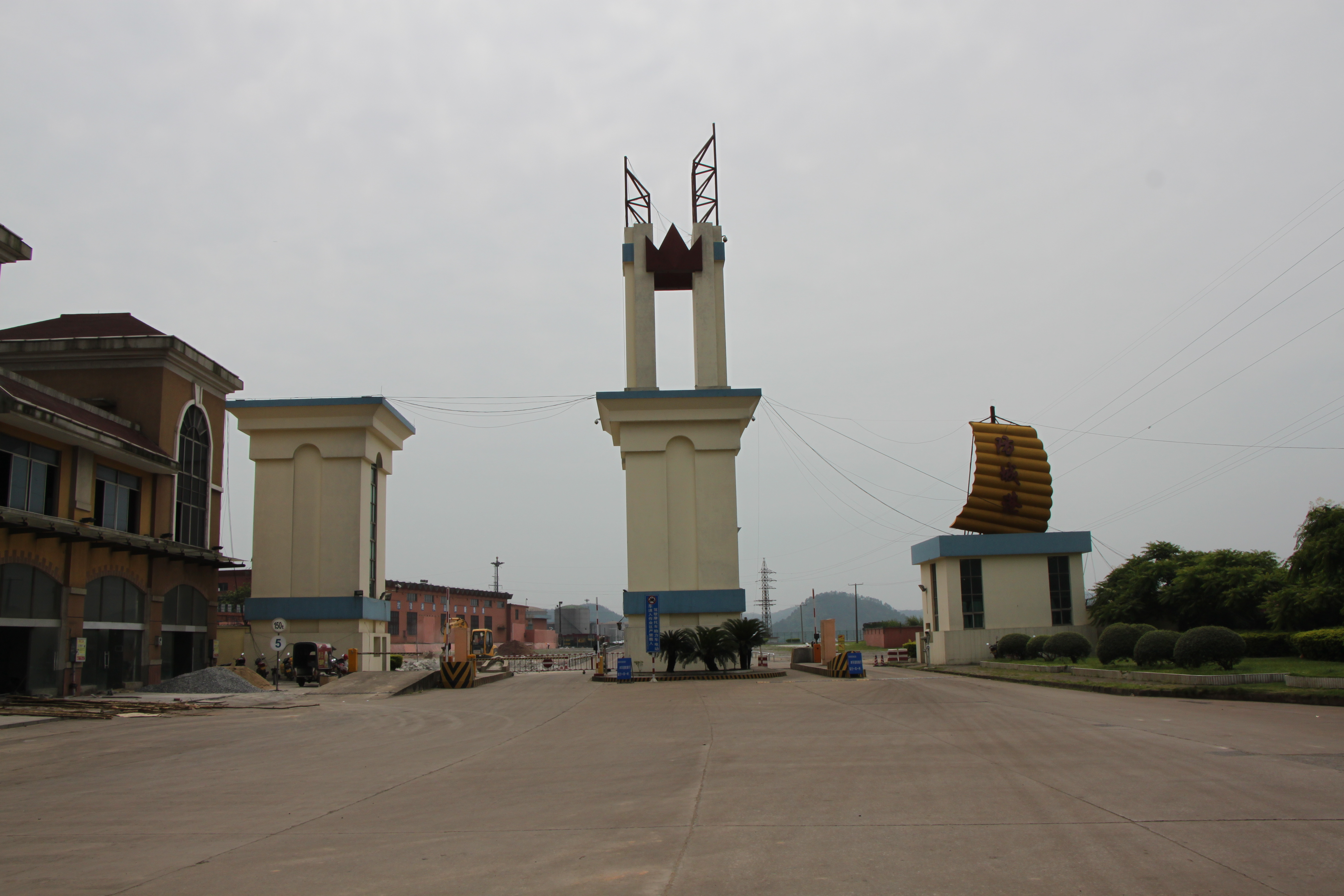 中文（中国大陆）: 防城港市 港务集团门口